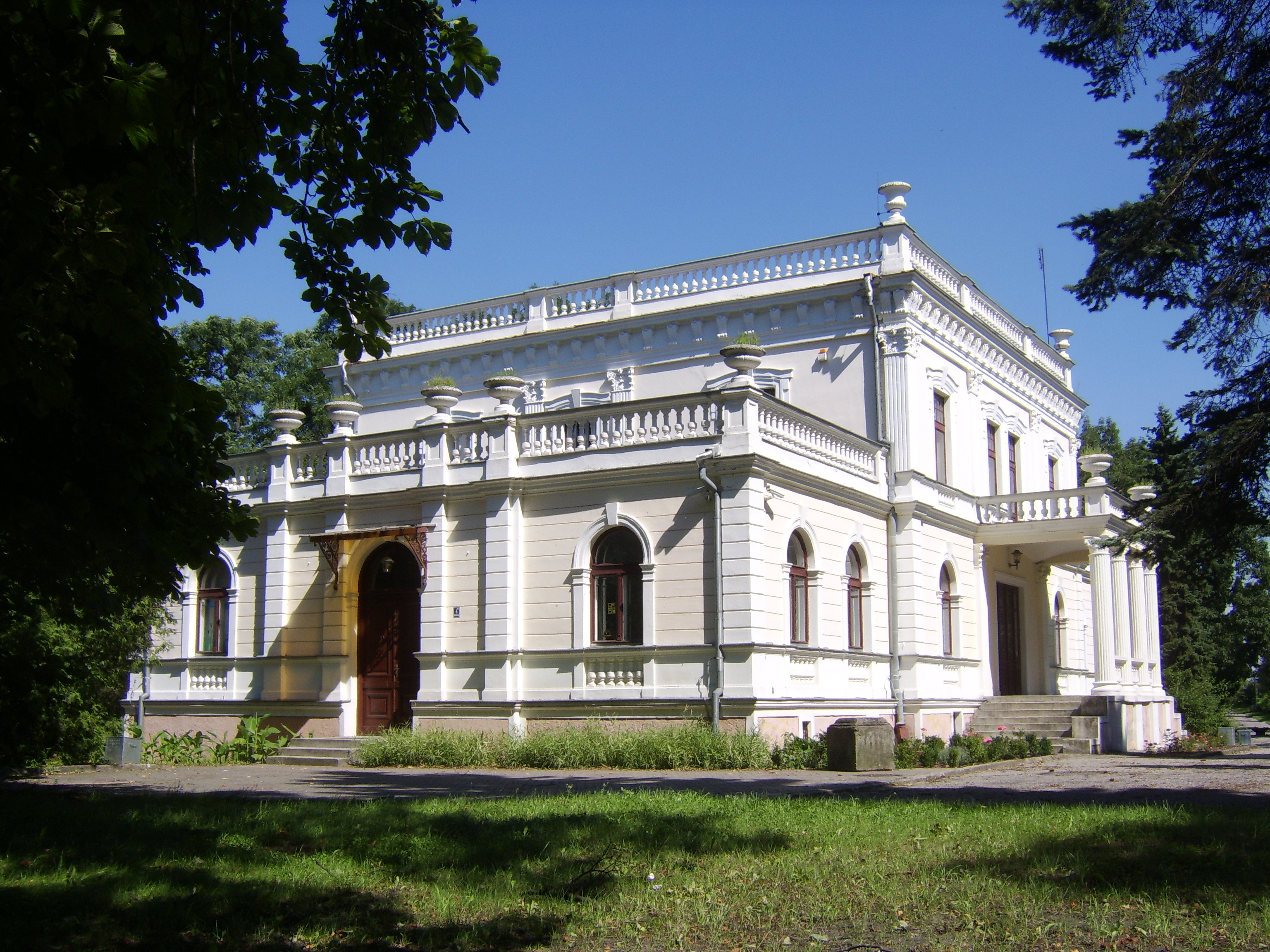 Aleksandrów Kujawski - zespół pałacowy: pałac, pocz. XX, oraz park, 1 poł. XIX w.